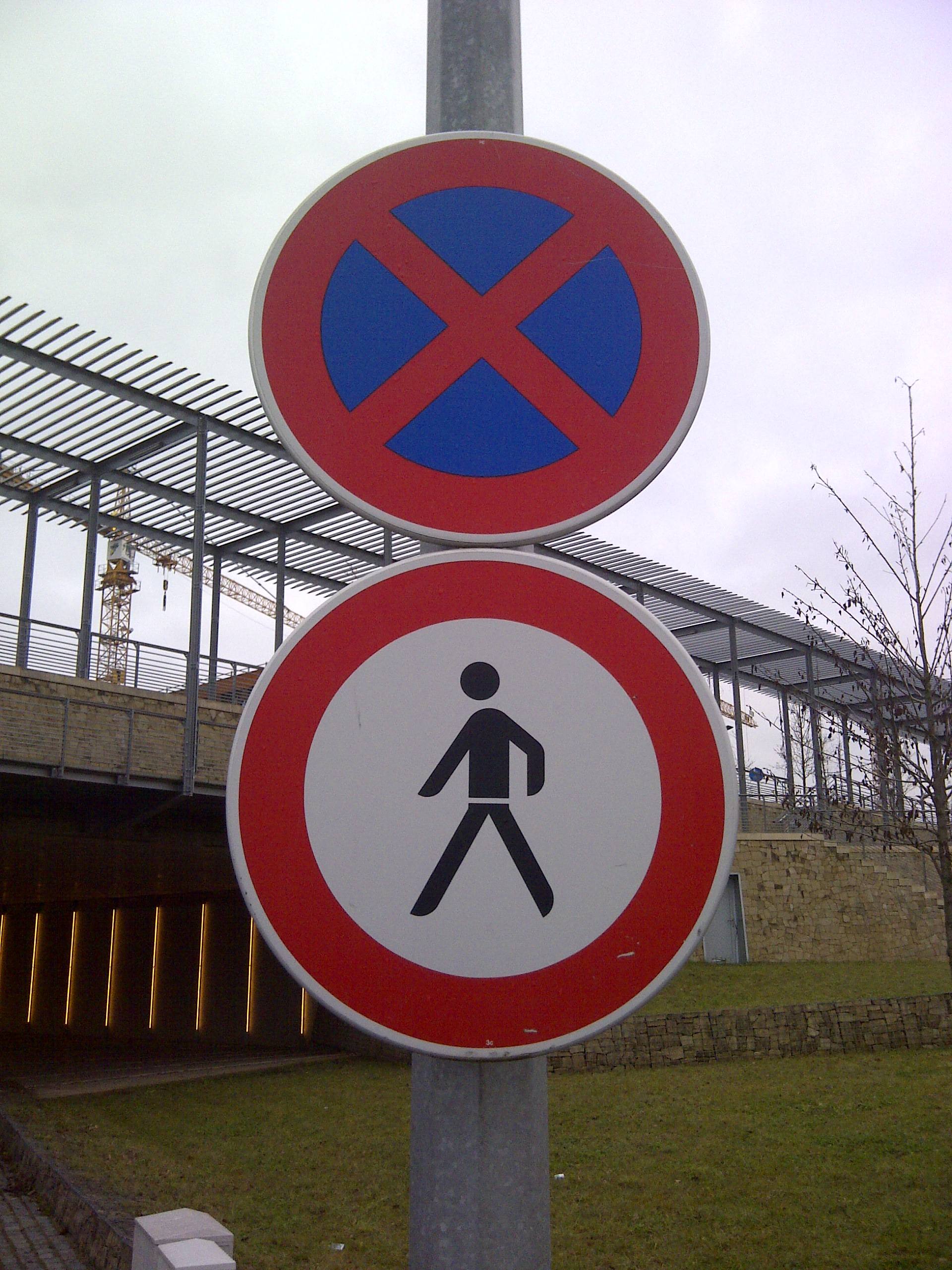 Verkéiersschëlter C,19 (uewen) "Verbuet fir stallzehalen"an C,3g (ennen) "Verbuet fir Foussgänger " aus dem lëtzebuerger Code de la Route .